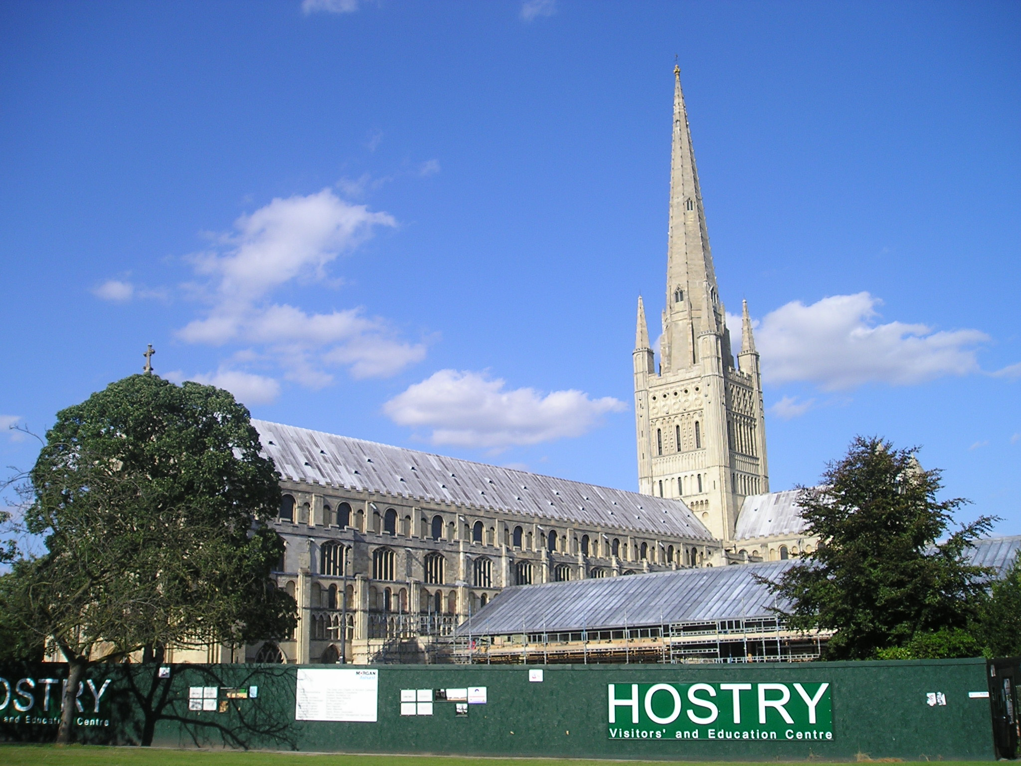 Norwich_Cathedral,_Gesamtansicht